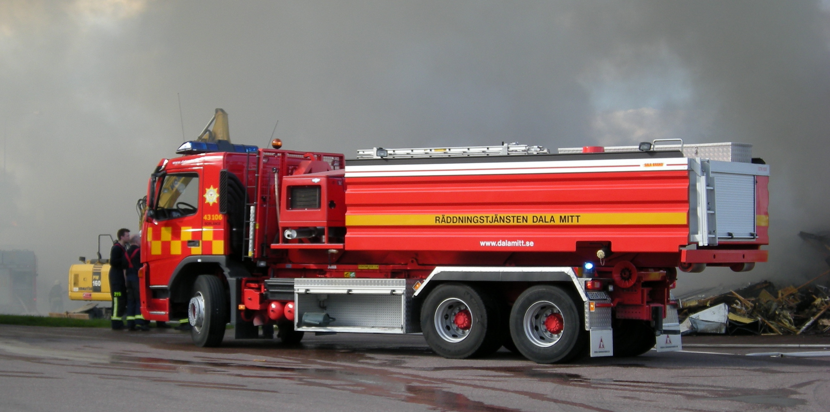 Brandbil, containerbil, Borlänge, Dalarna